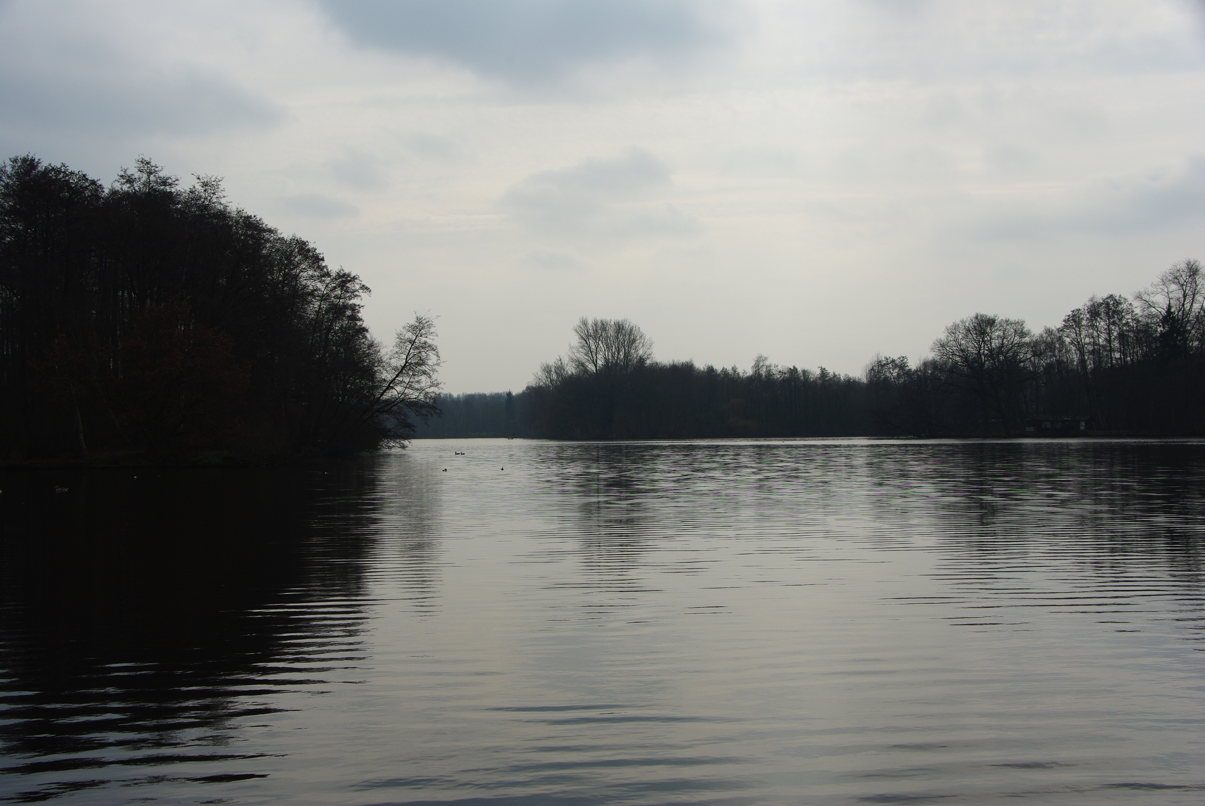 Großer De Wittsee, Frühlingstour bei Schloß Krickenbeck